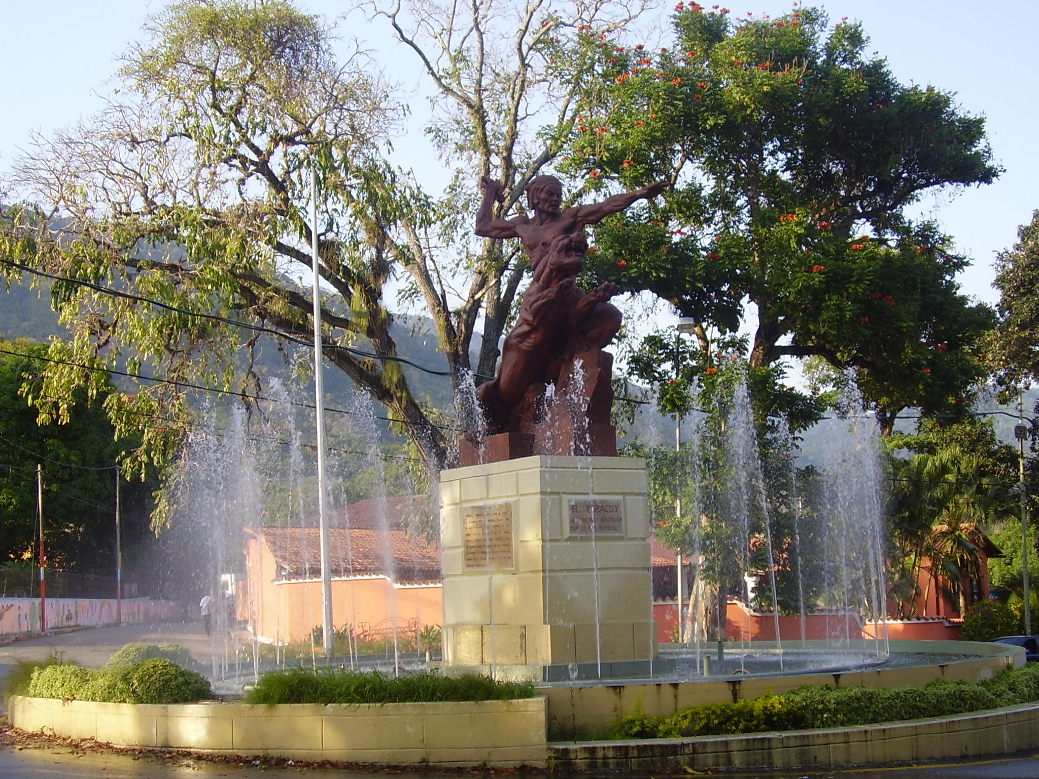 Monumentos yaracuyanos: Indio Yara.JPG